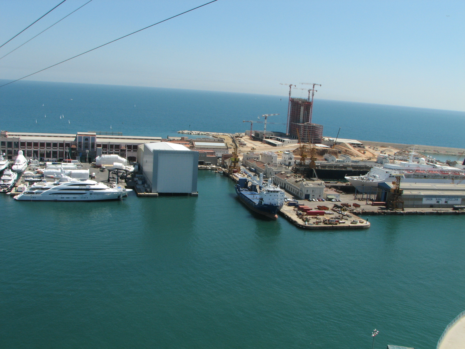 Barcelona